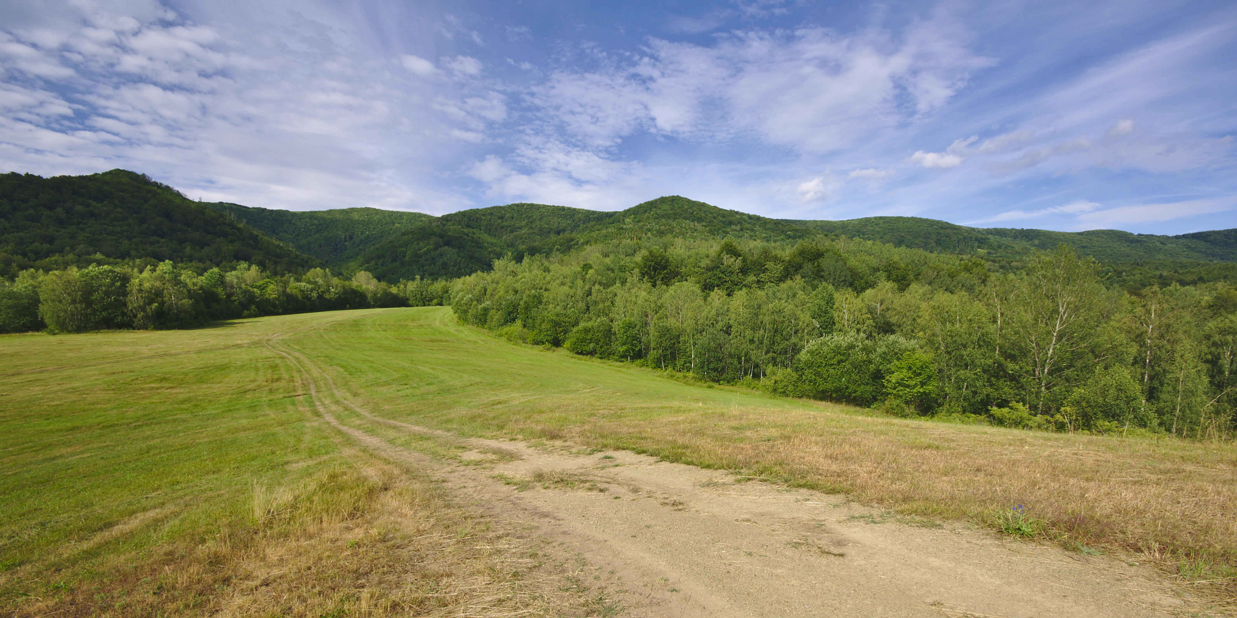 Národná prírodná rezervácia Jarabá skala, Národný park Poloniny